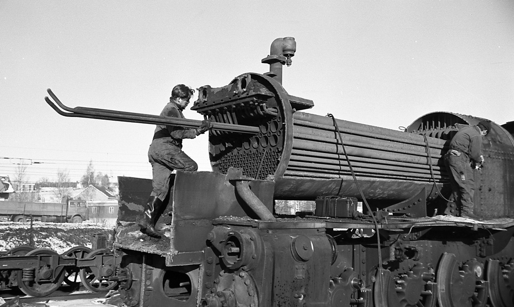 HUgging av damplok 222 på Grorud februar 1971. Overheterør trekkes ut av de store røykrørene.